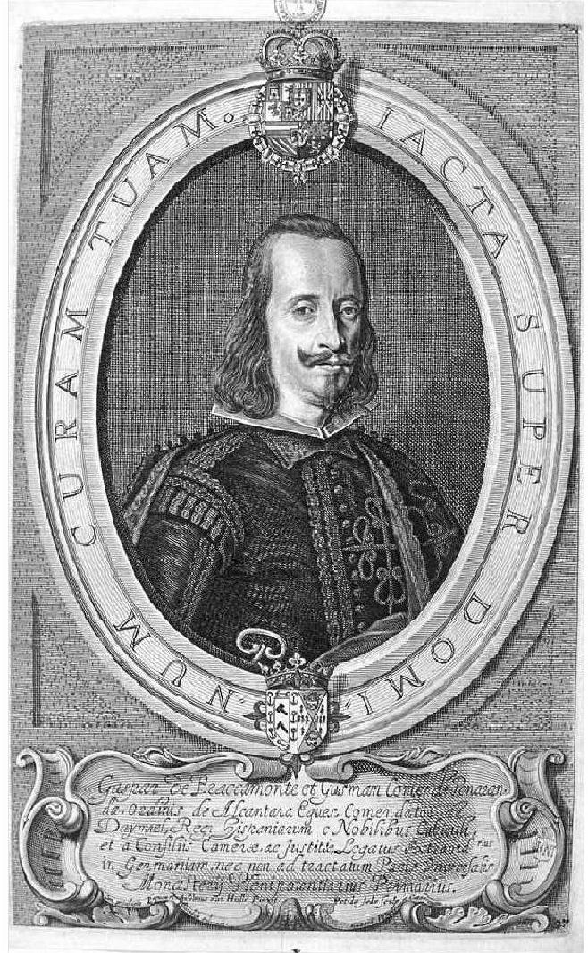 Grabado del III Conde de Peñaranda, don Gaspar de Bracamonte y Guzmán